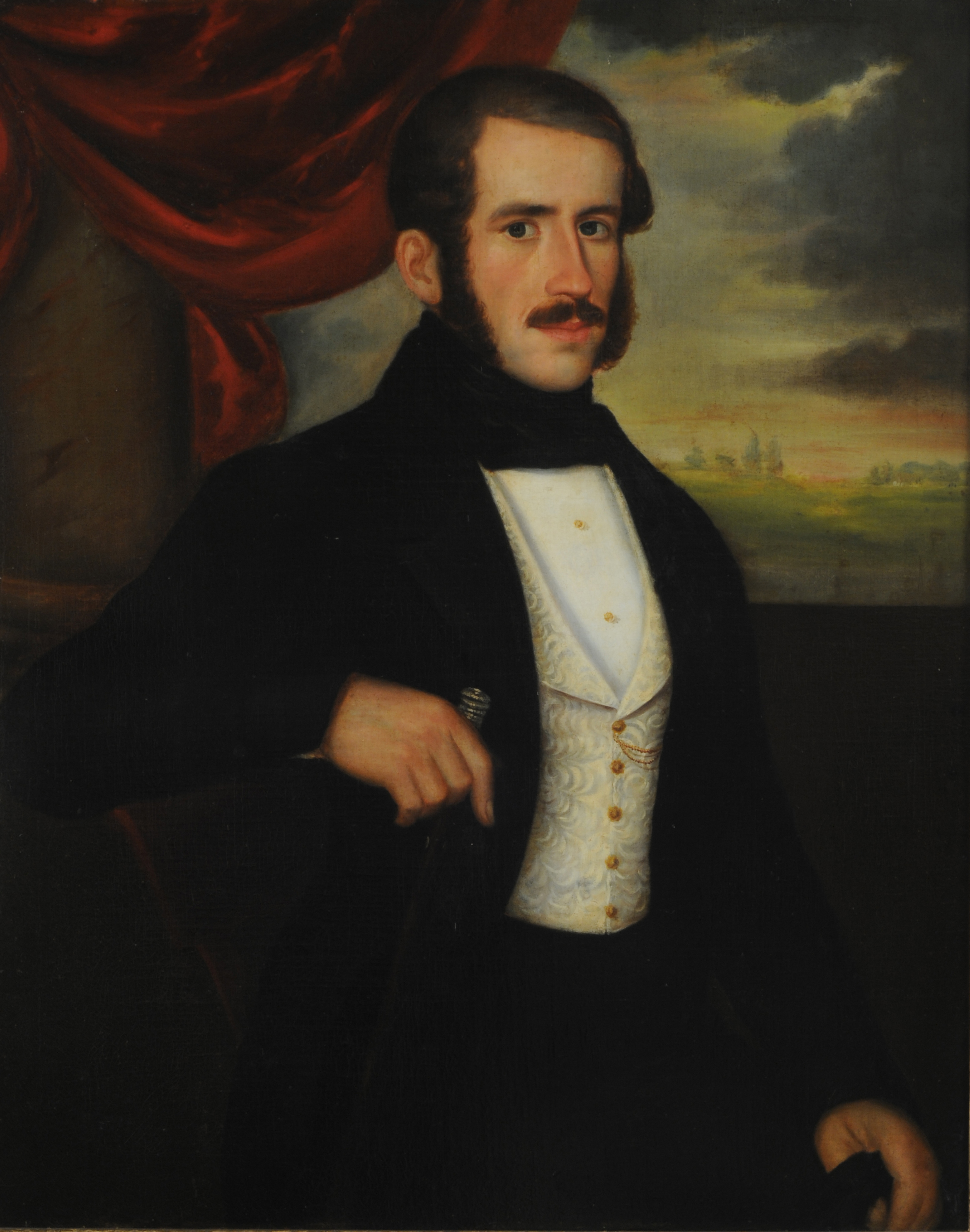 Amadeo Gras, Retrato de Antonio Rodríguez Ro. 1856. 92 x 76 cm, con marco: 112 x 92,5 cm, óleo sobre tela. Inv. 6652.